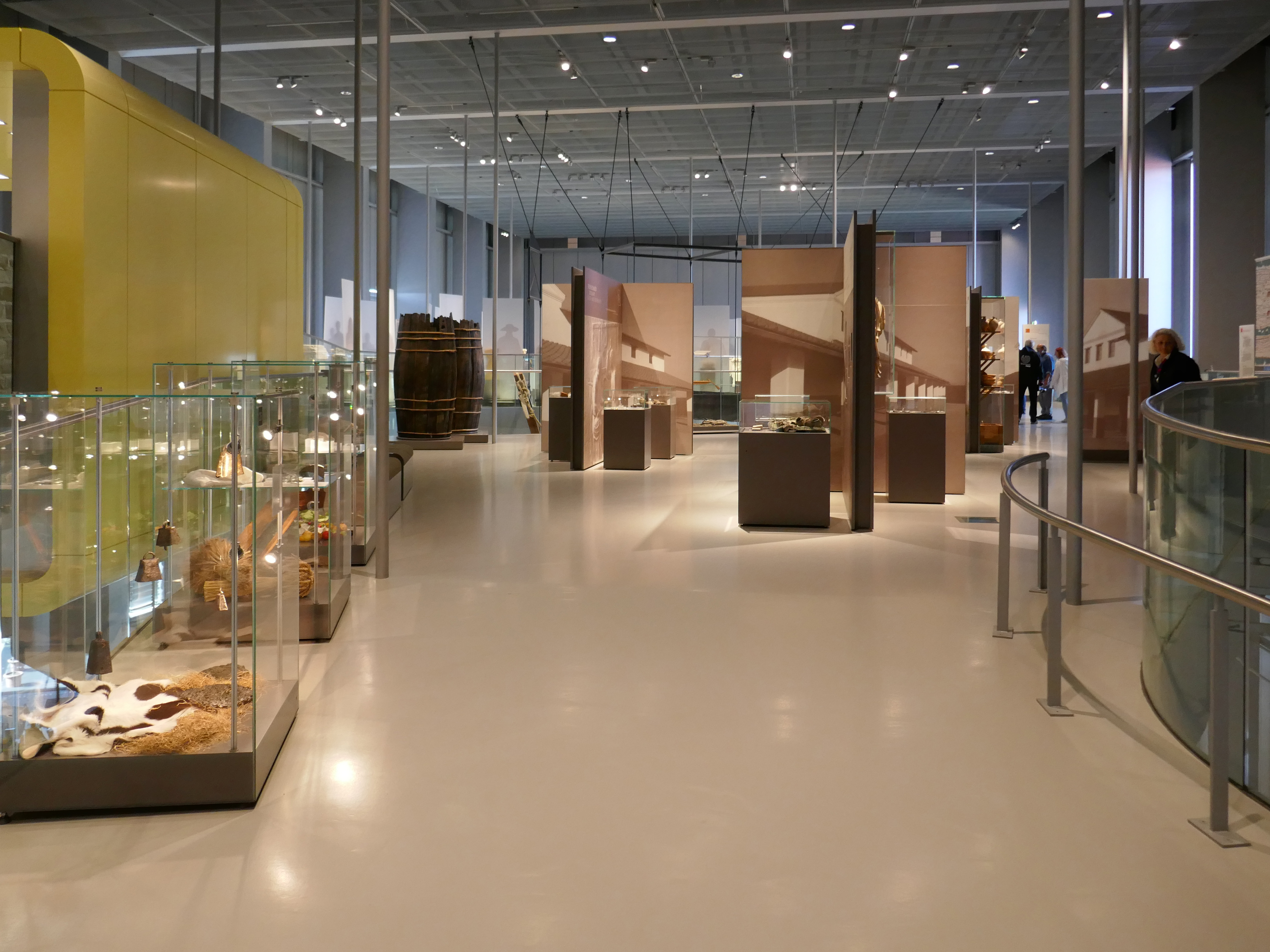 GLAM on Tour/Wikipedia trifft...die Colonia Ulpia Traiana im LVR-Archäologischen Park Xanten - Die Ausstellung.